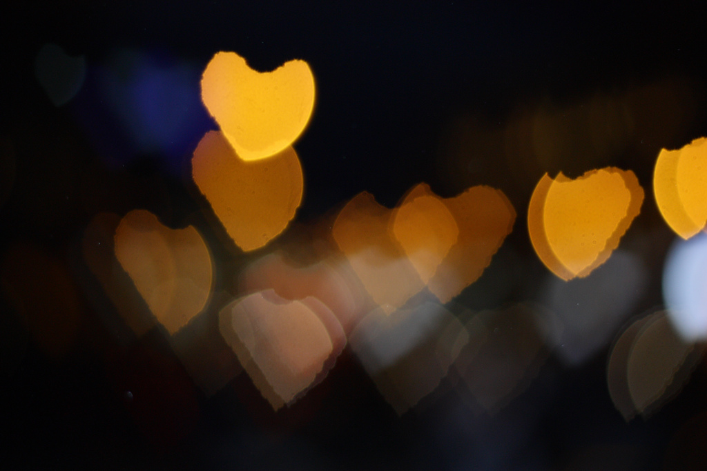 Bokeh heart